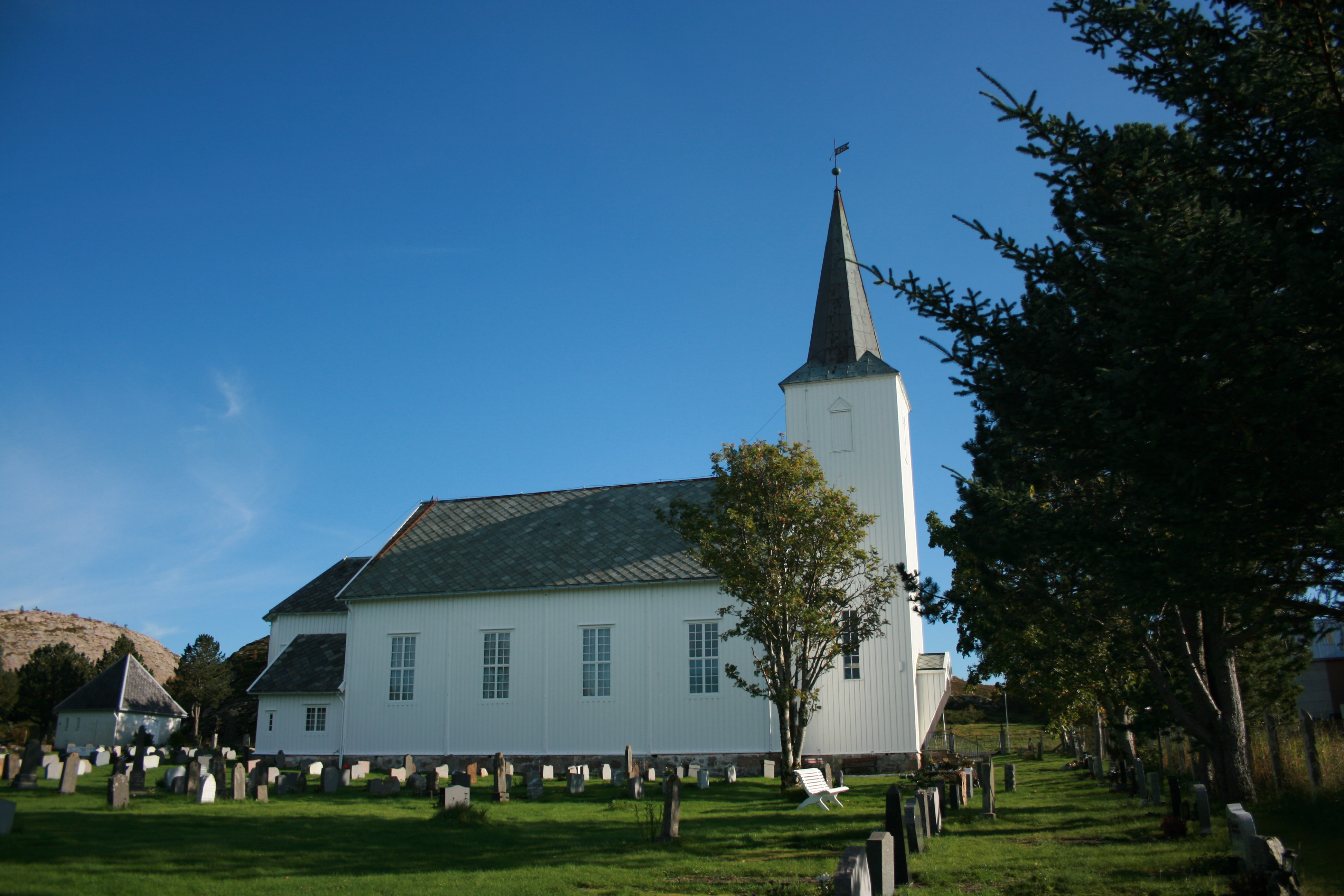 Jøssund kirke i Bjugn kommune er fra 1875. Bildet er tatt 17.9.2011 med et Canon EOS 400 D.